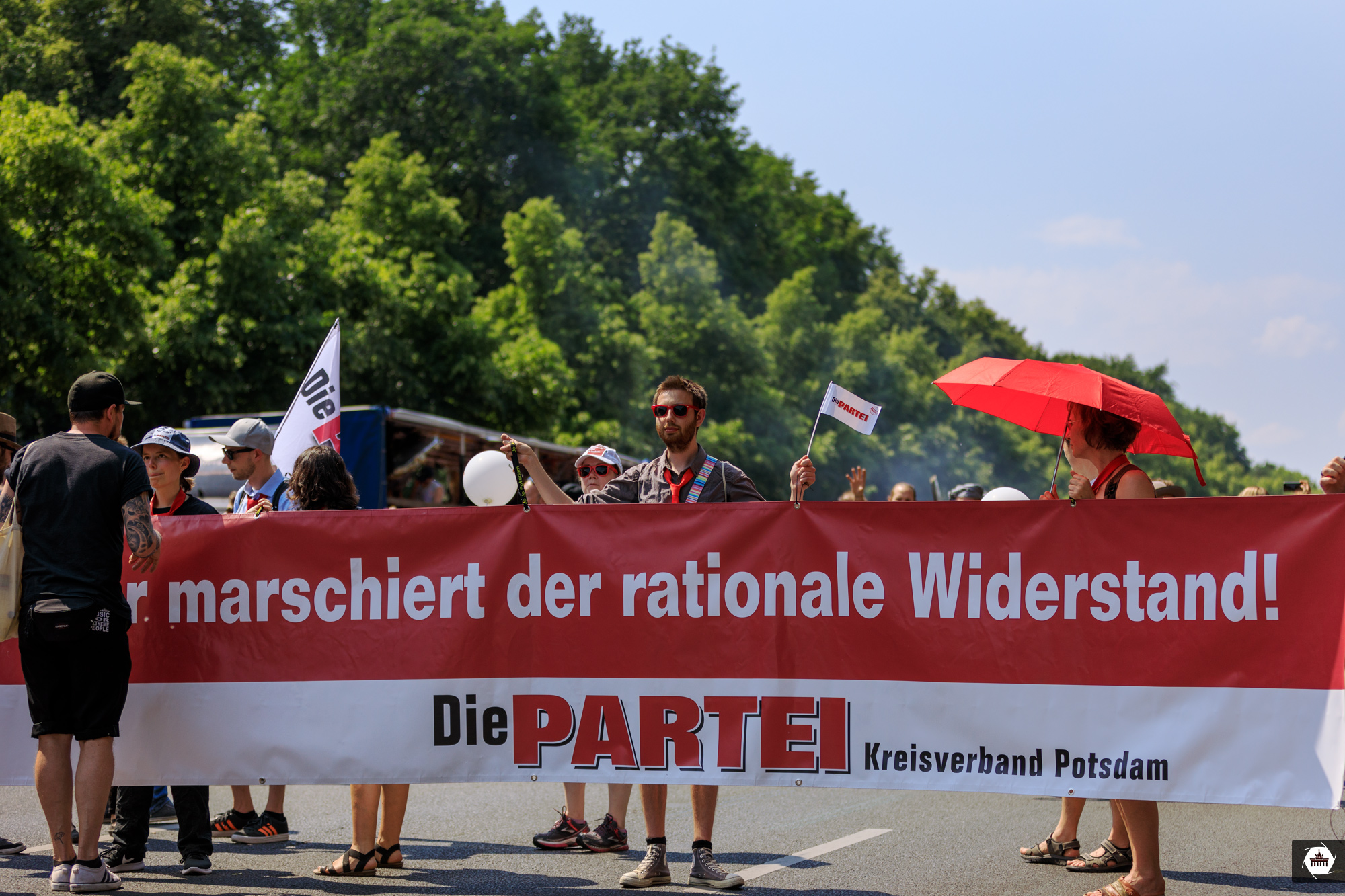 Die PARTEI mit Banner „Hier marschiert der rationale Widerstand“ bei der AfDwegbassen Demo am 27.05.2018